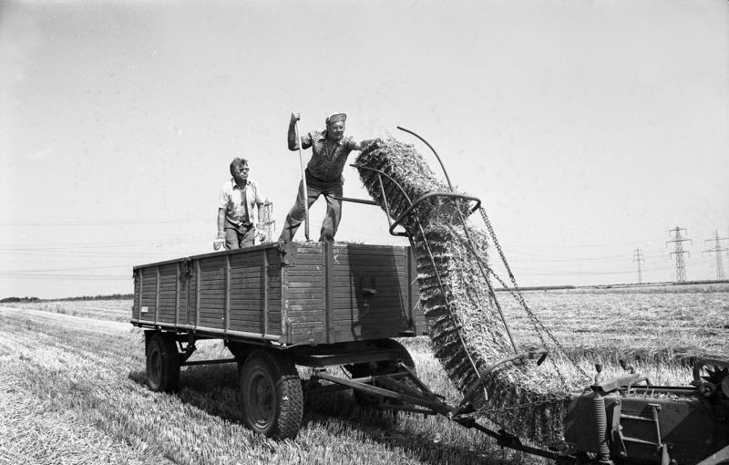 21.8.1991 Landwirtschaftlicher Betrieb bei Meckenheim, Einbringen des Strohs Information added by Wikimedia users.